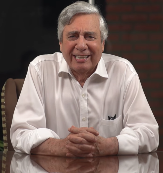 Alcade Percy Fernández en marzo de 2015